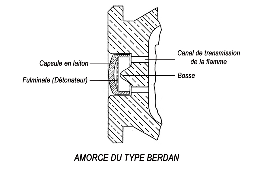 Schnittbild Berdanzünder